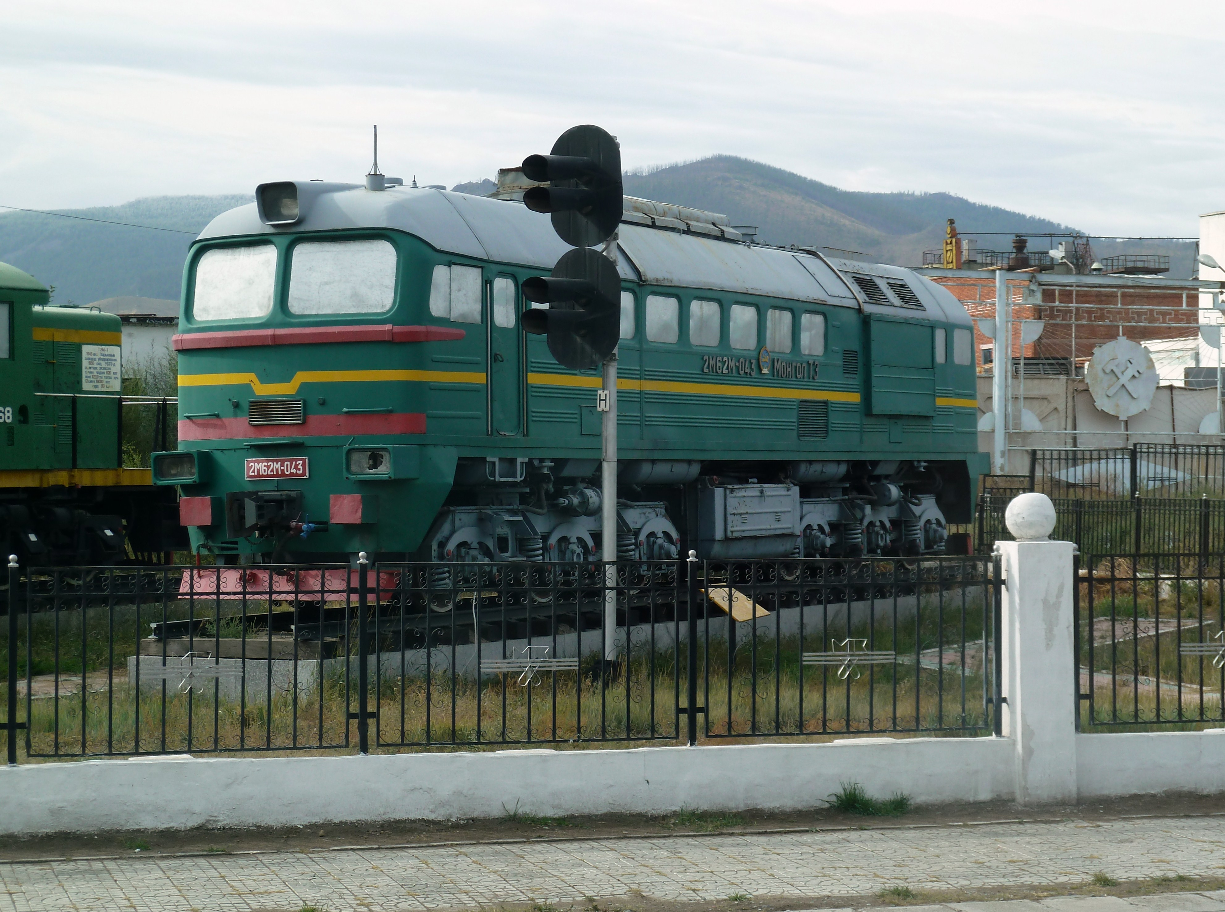 2M62 of Mongolia (Transport ferroviaire en Mongolie, en Mongolie.